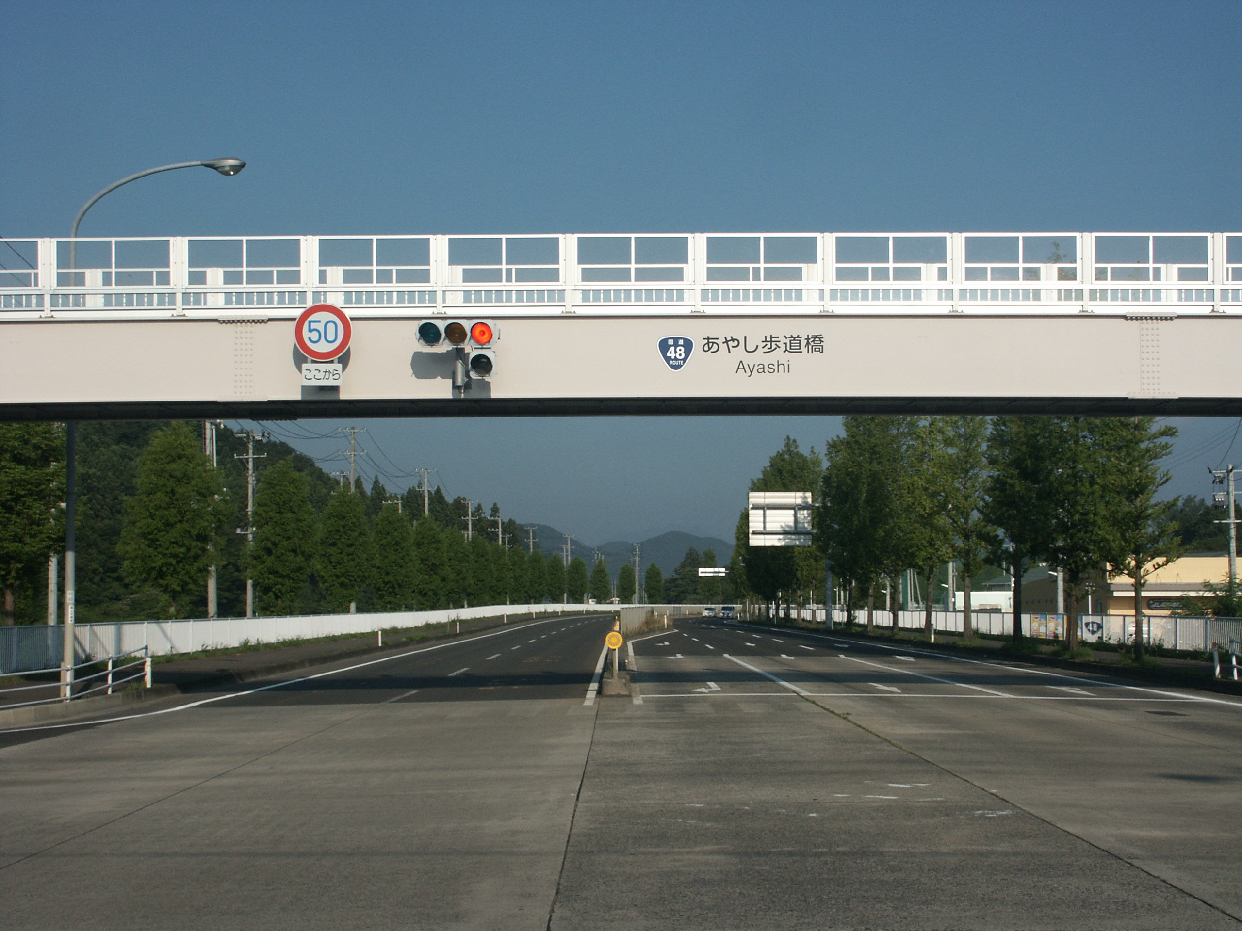 国道48号線愛子バイパスあやし歩道橋付近